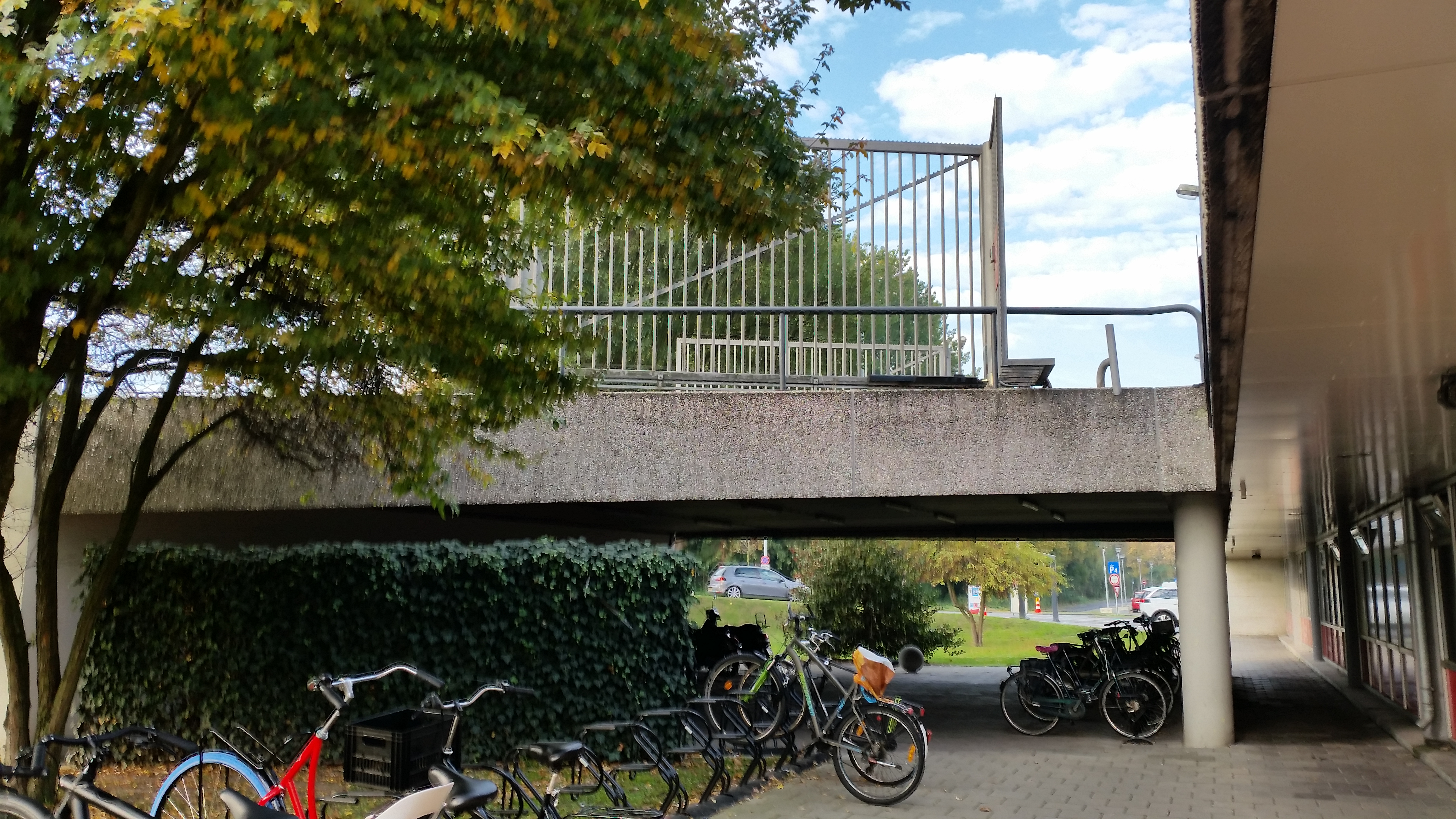 Aansluitend viaduct op Brug 856 (in Amsterdam)